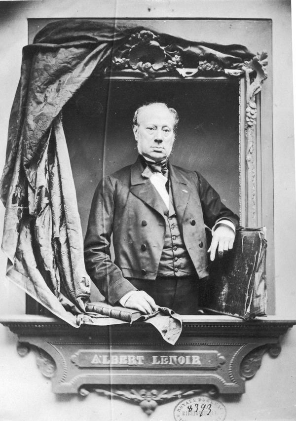 Portrait d'Albert Lenoir (1801-1891), vers 1875, historien, archéologue, écrivain, voyageur et peintre